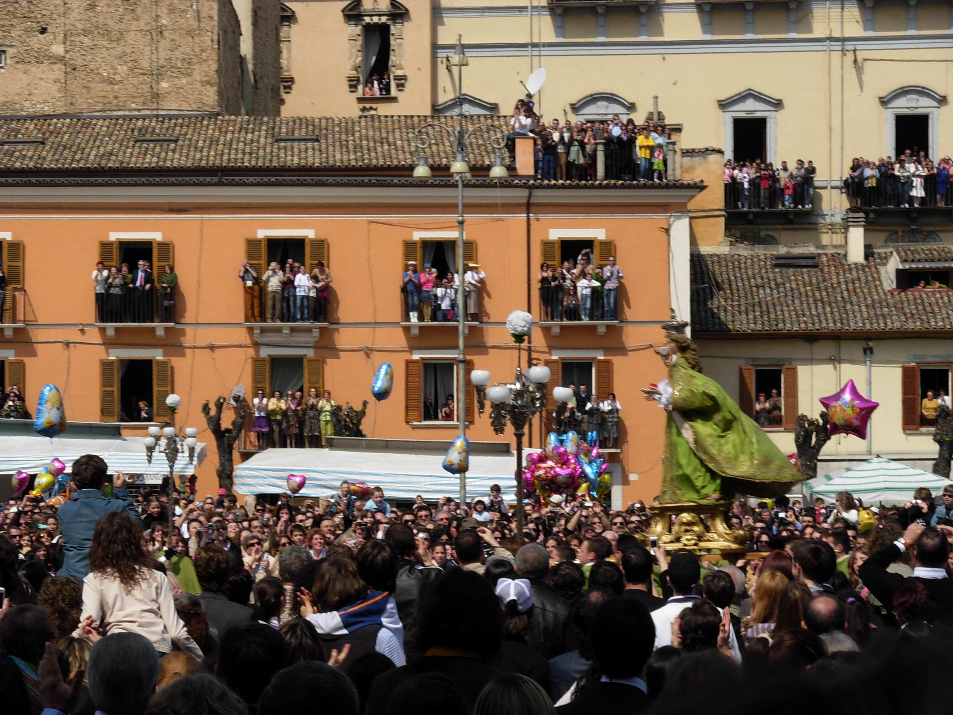 Foto della Madonna che scappa in piazza. Sulmona, Pasqua 2007